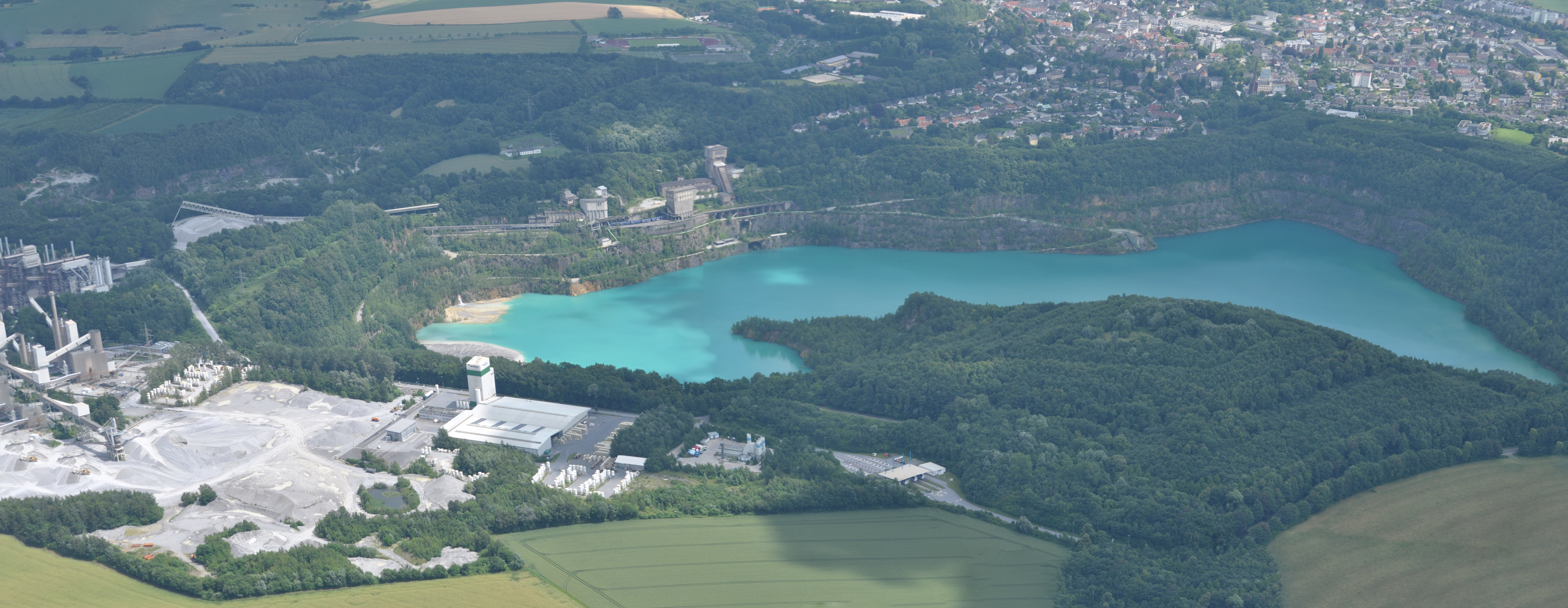 Das Kalkwerk und ehem. Grube, Flandersbach, Wülfrath